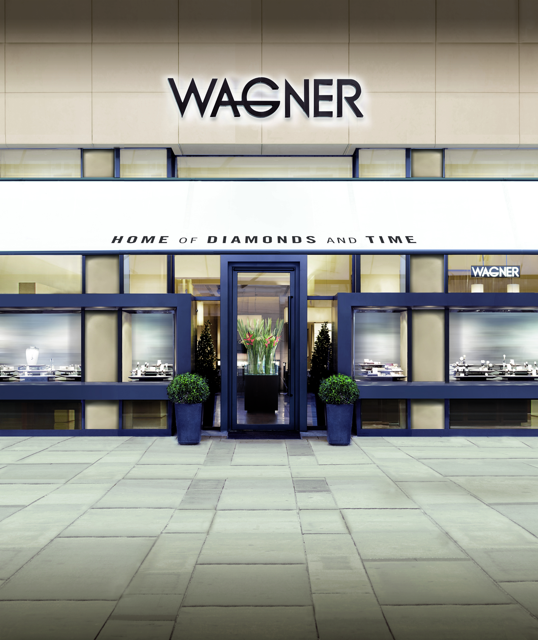 Portal von Juwelier Wagner in der Kärntner Straße, 1010 Wien.